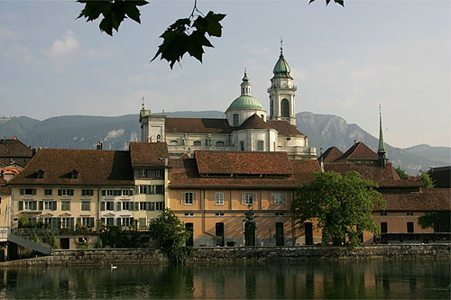 St.Ursen-Kathedrale in Solothurn